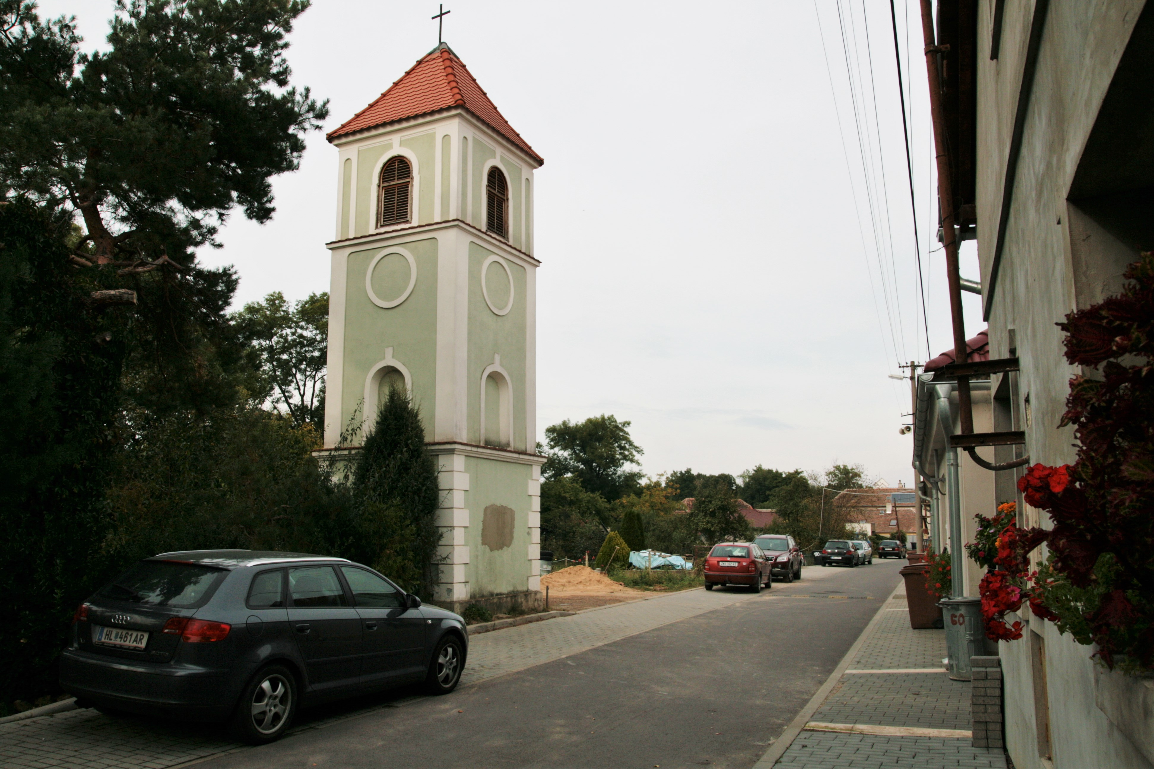 Oblekovice, část okresního města Znojmo v Jihomoravském kraji. Zvonička ve sloučené vsi Nesachleby.